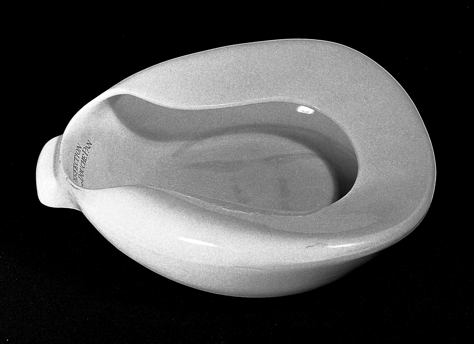 Bedpan Wellcome Images